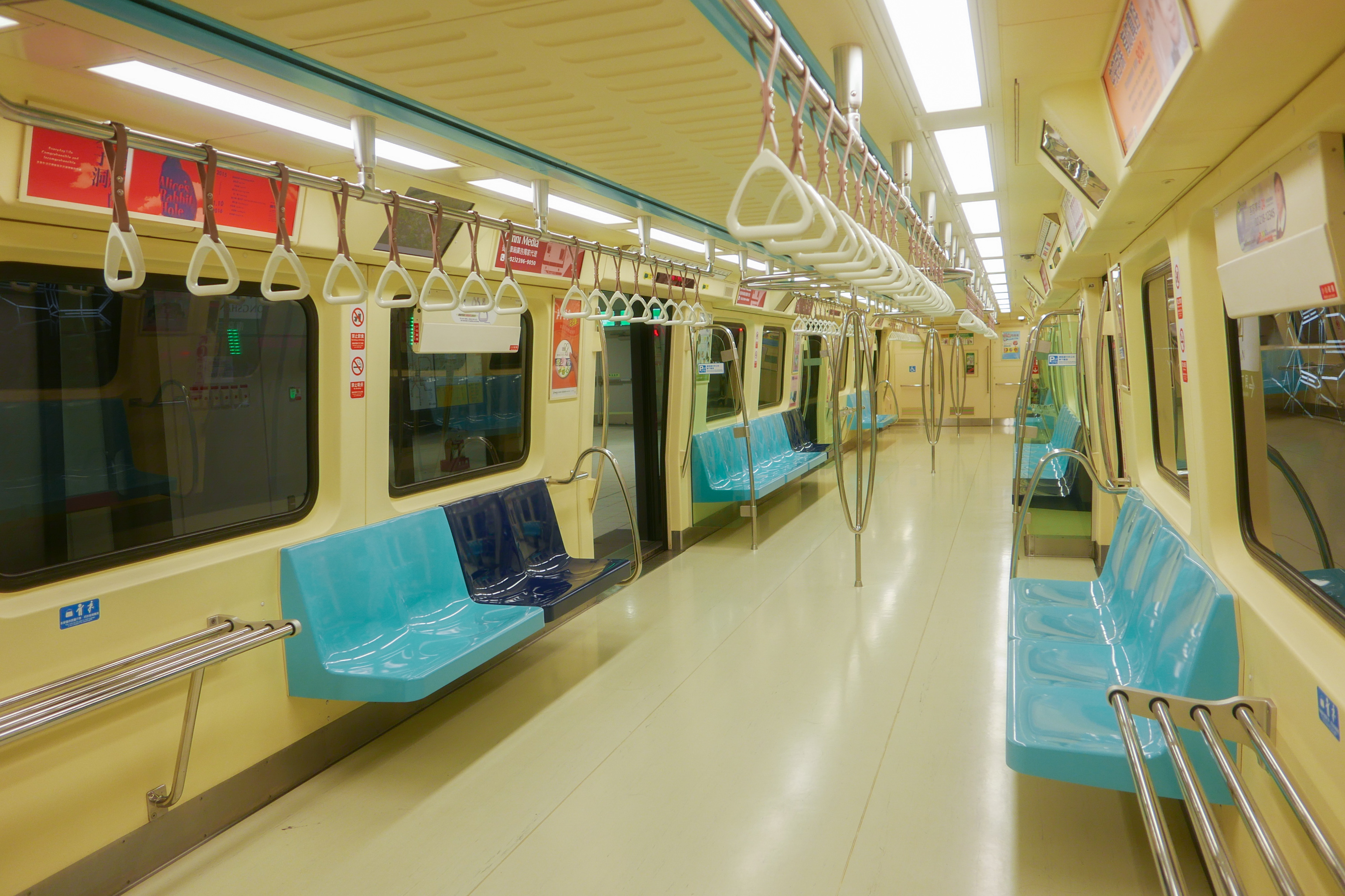 台北捷運381型高運量電聯車 車内 535・536編成（1536） 川崎重工業車両カンパニー、2011年製造